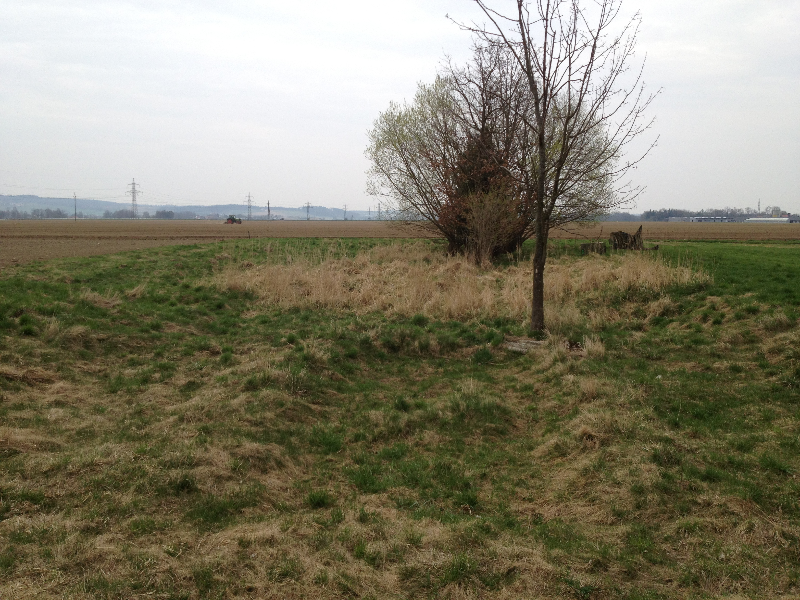 Tergolape